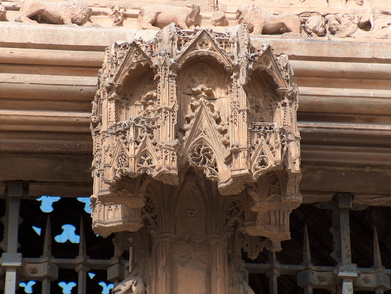 Sé Velha de Lérida. Sé Velha de Lérida em Espanha.